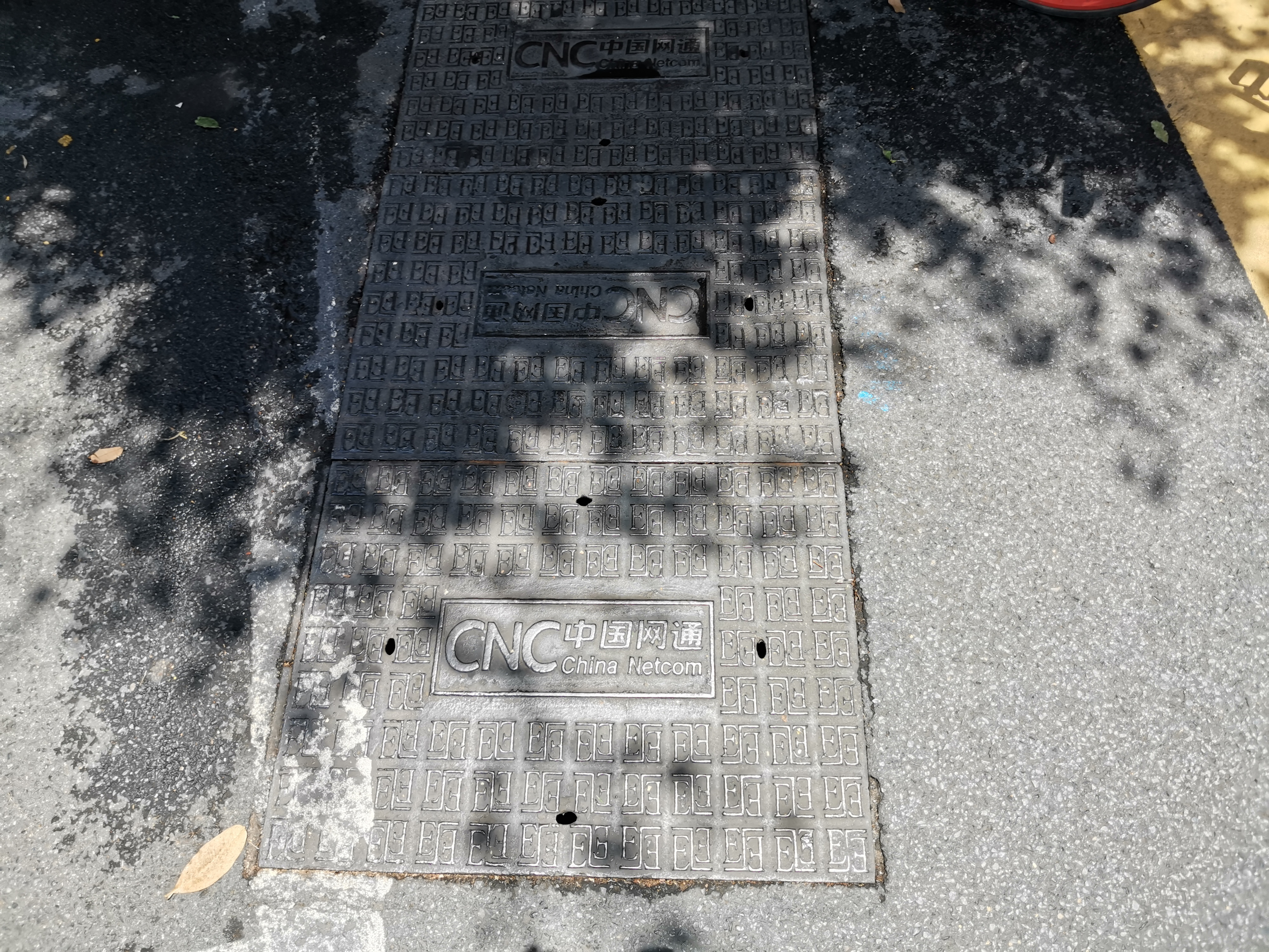 中国网通井盖，带有其第一代标志